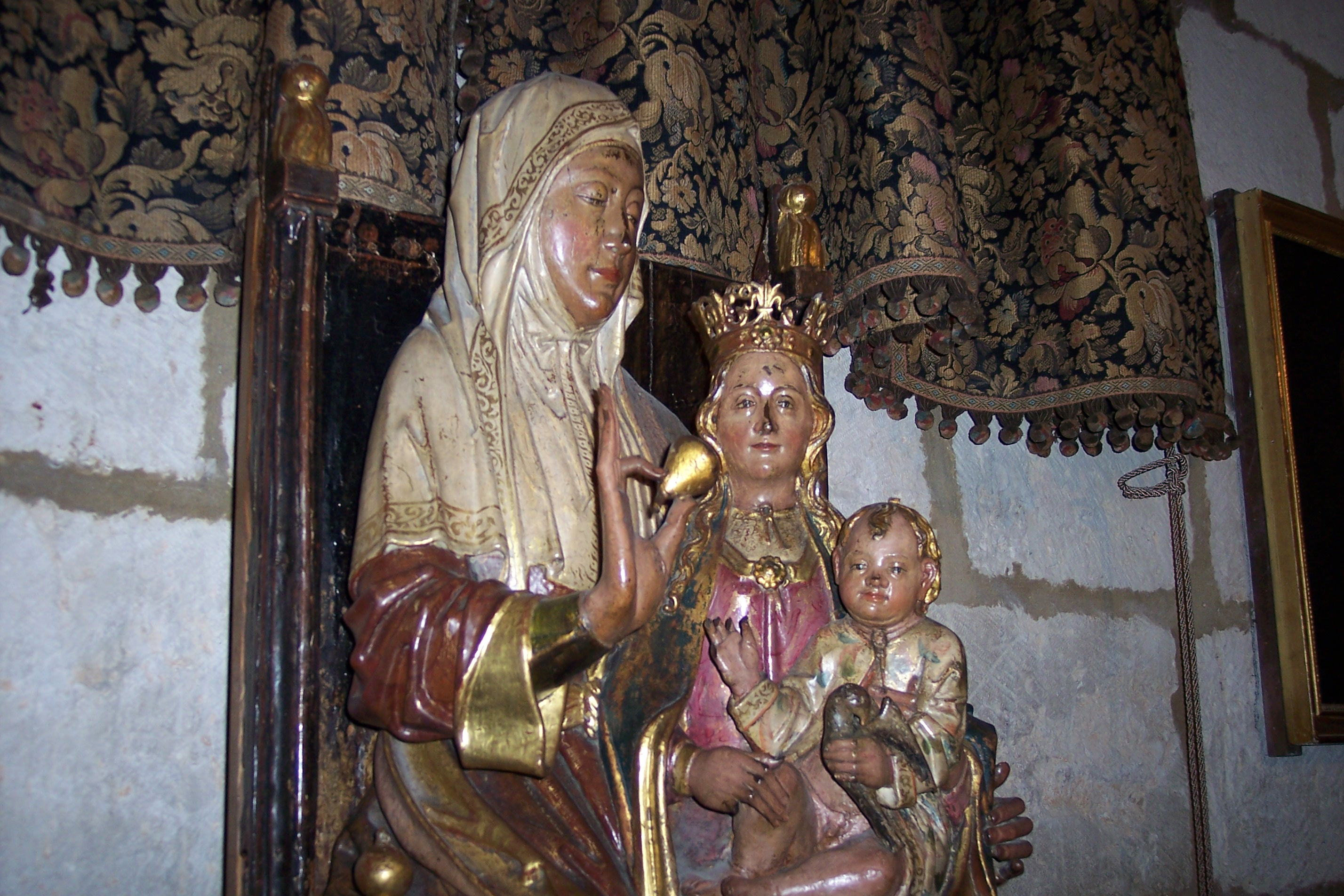 Detalle de Santa Ana Triple. Obra de Alejo de Vahía, hacia 1510. Museo Catedralicio de Palencia.